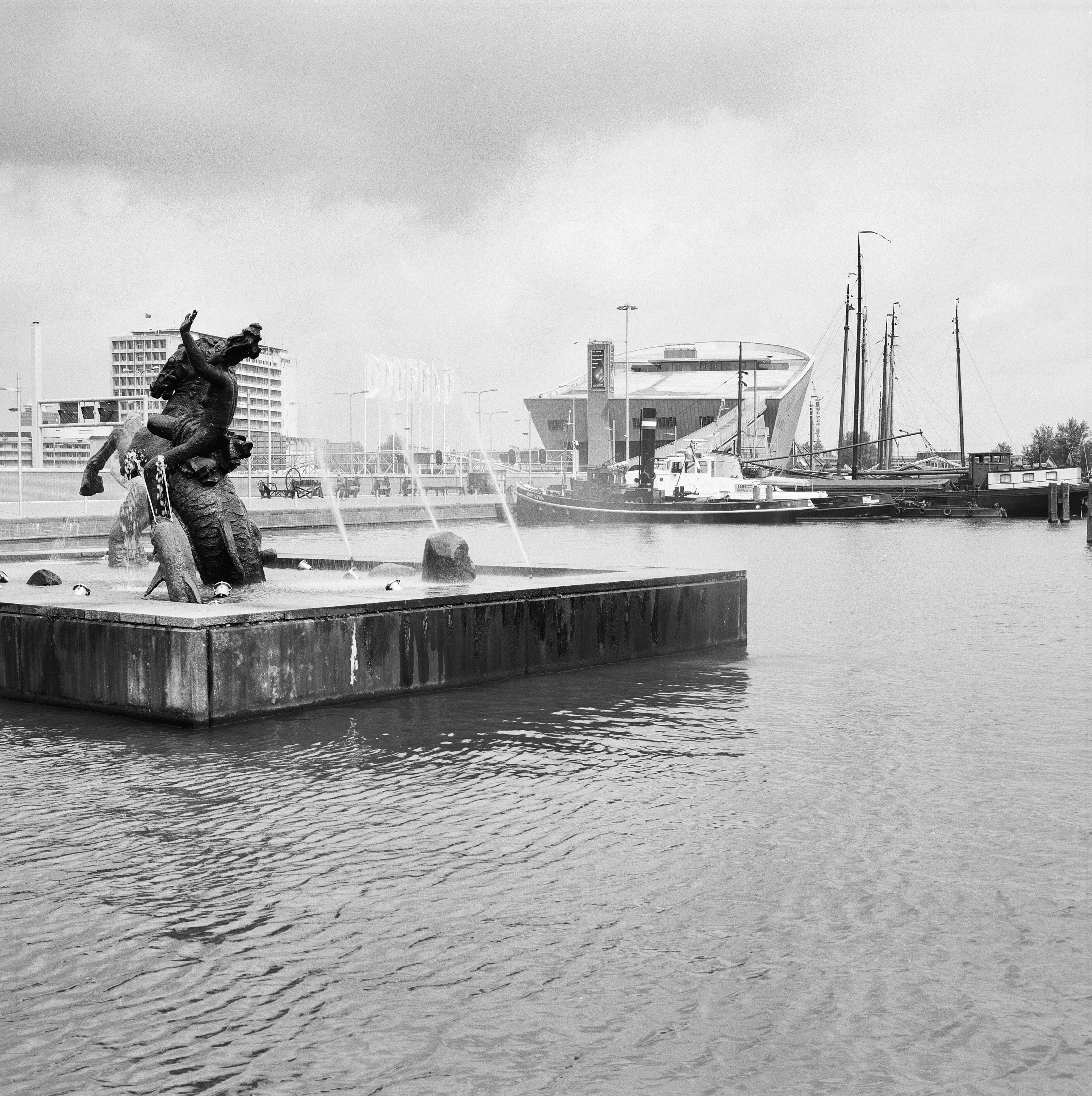 MUSEUM (BOVEN IJ-TUNNEL): Exterieur OVERZICHT; dit beeld is in 2009 verhuisd